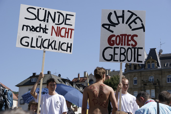 Gegendemonstration, zu der die Piusbruderschaft aufgerufen hat, beim Christopher Steet Day in Stuttgart.